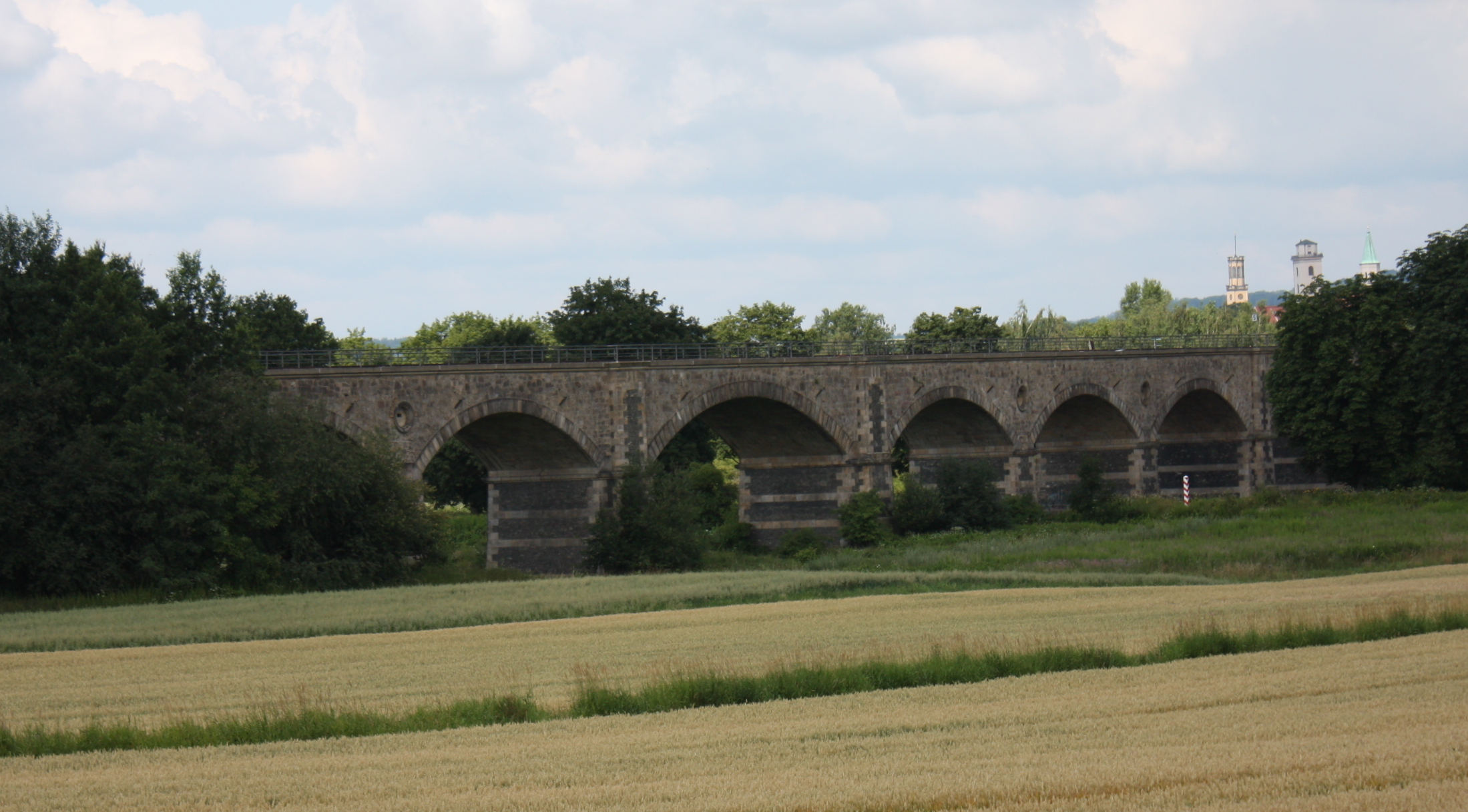 This photo of Lower Silesian Voivodeship was taken during Wikiexpedition 2013 set up by Wikimedia Polska Association.You can see all photographs in category Wikiekspedycja 2013. Permission=Ludwig Schneider put it under GFDL and Creative Commons Attribution ShareAlike 3.0,2.5,2.0,1.0 and cc-by-sa-4.0 - self